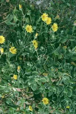 Sicilian botanical endemisms Calendula maritima